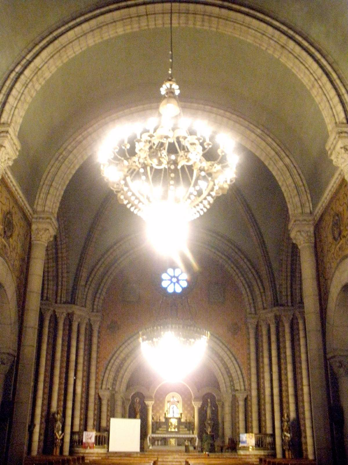 La Felguera (Langreo, Asturias)) - Iglesia de San Pedro